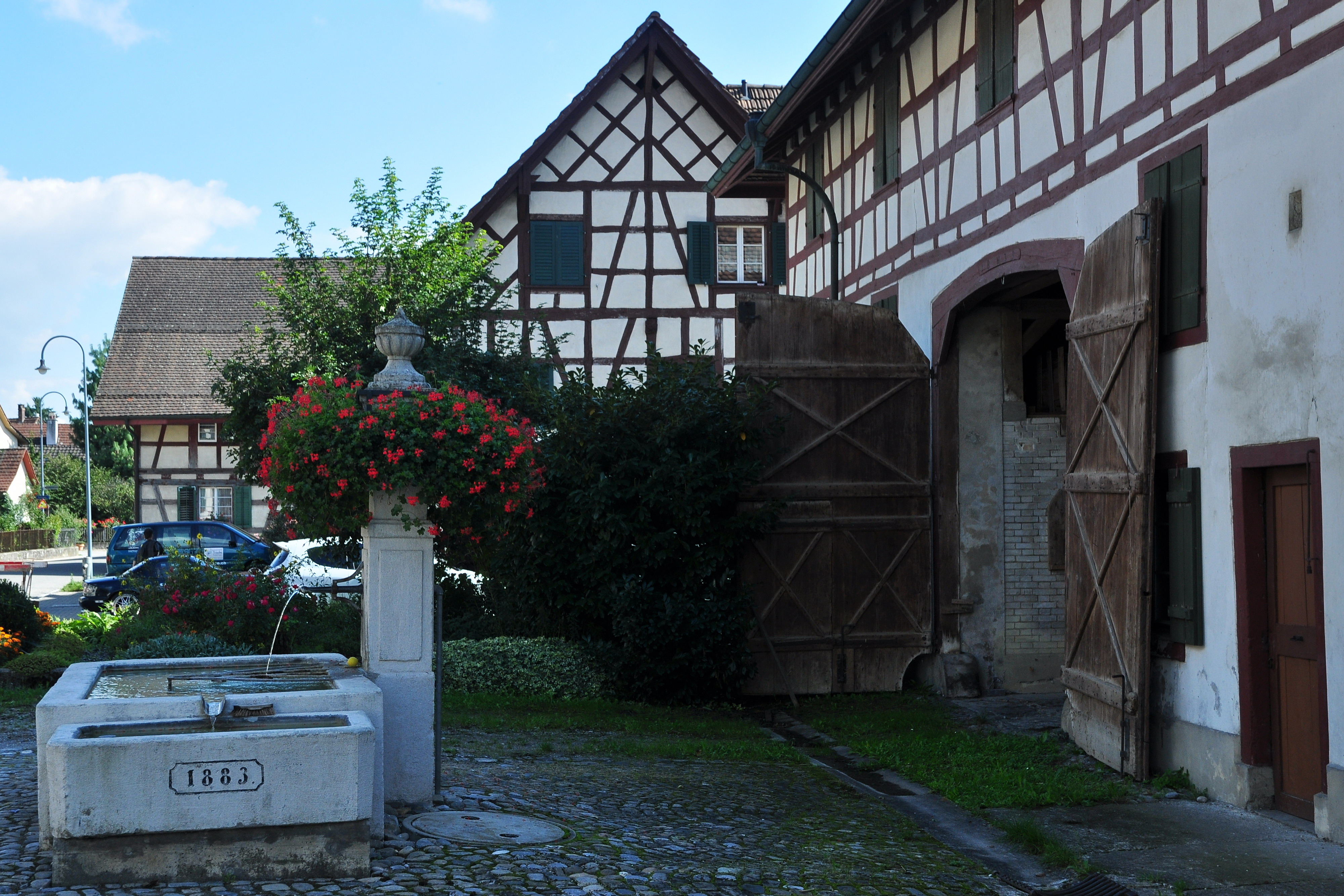 Herrschaftshaus und Doppelscheune, Rudolfingen, Dorfstrasse in Trüllikon (Switzerland)